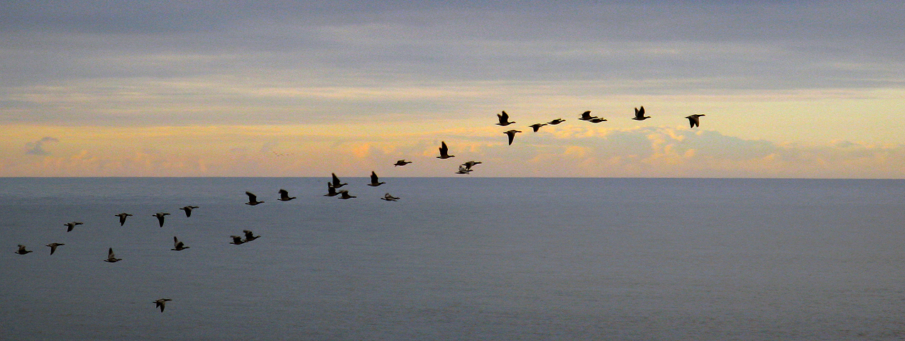 Vitkindad gås (Branta leucopsis) sträckar väst, tidigt en morgon vid Världens ände Ystad.